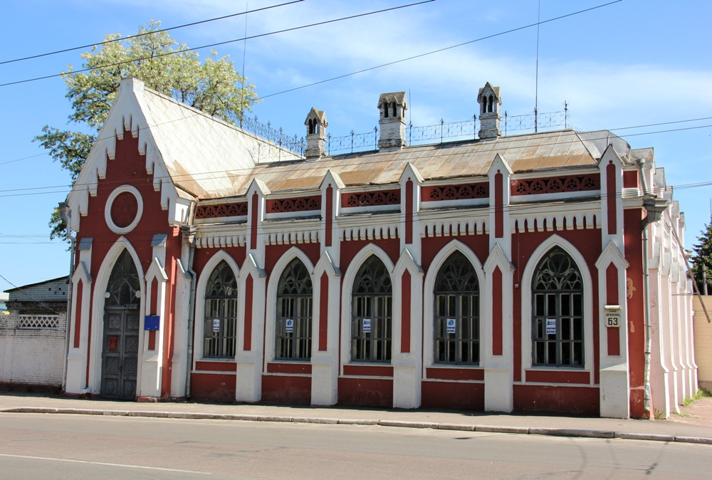 Музей українських старожитностей Тарновського, зараз бібліотека